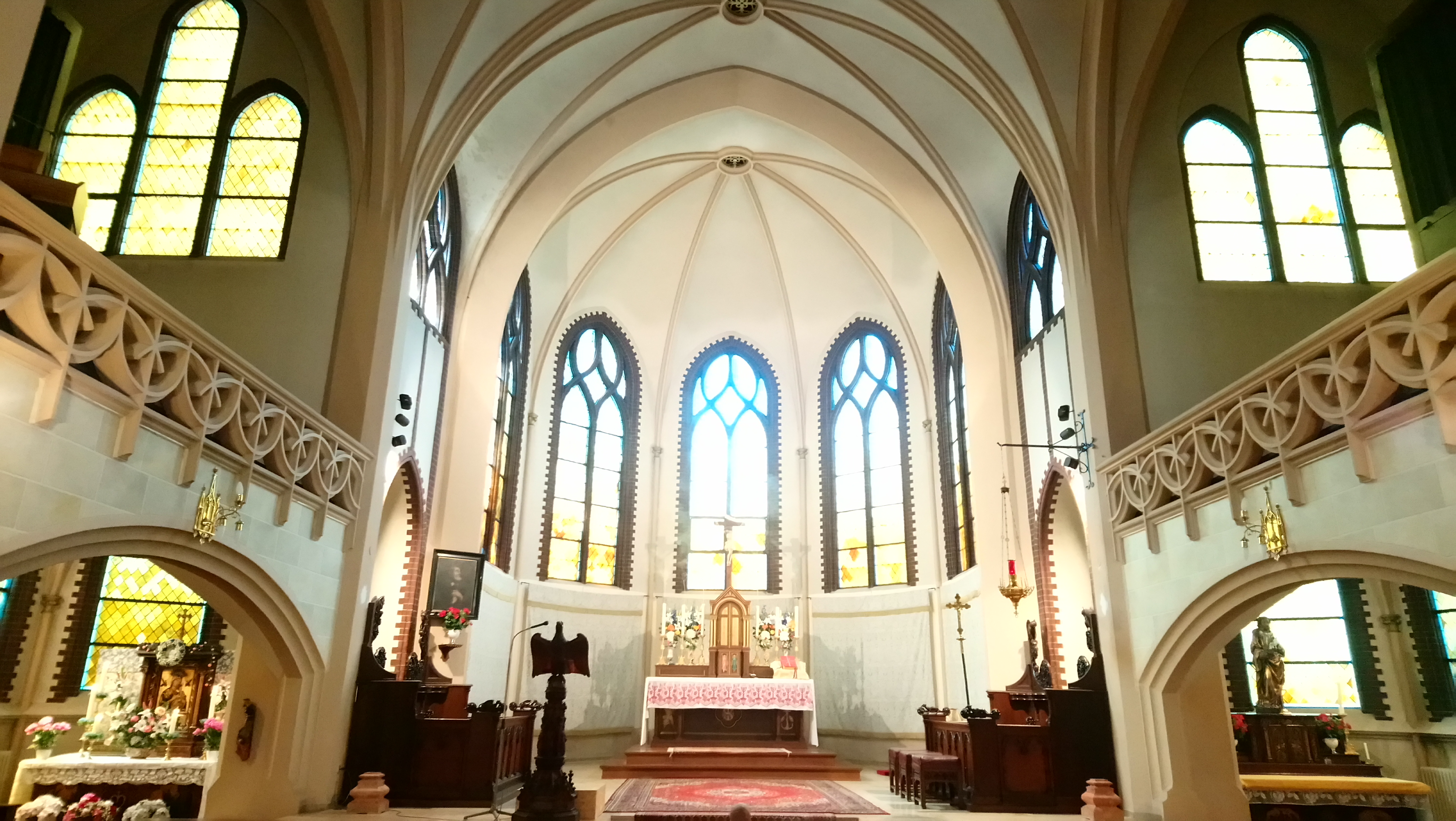 Katholische Kirche St. Afra, Berlin-Wedding, Innenraum, Chor und Altarraum mit Hochaltar